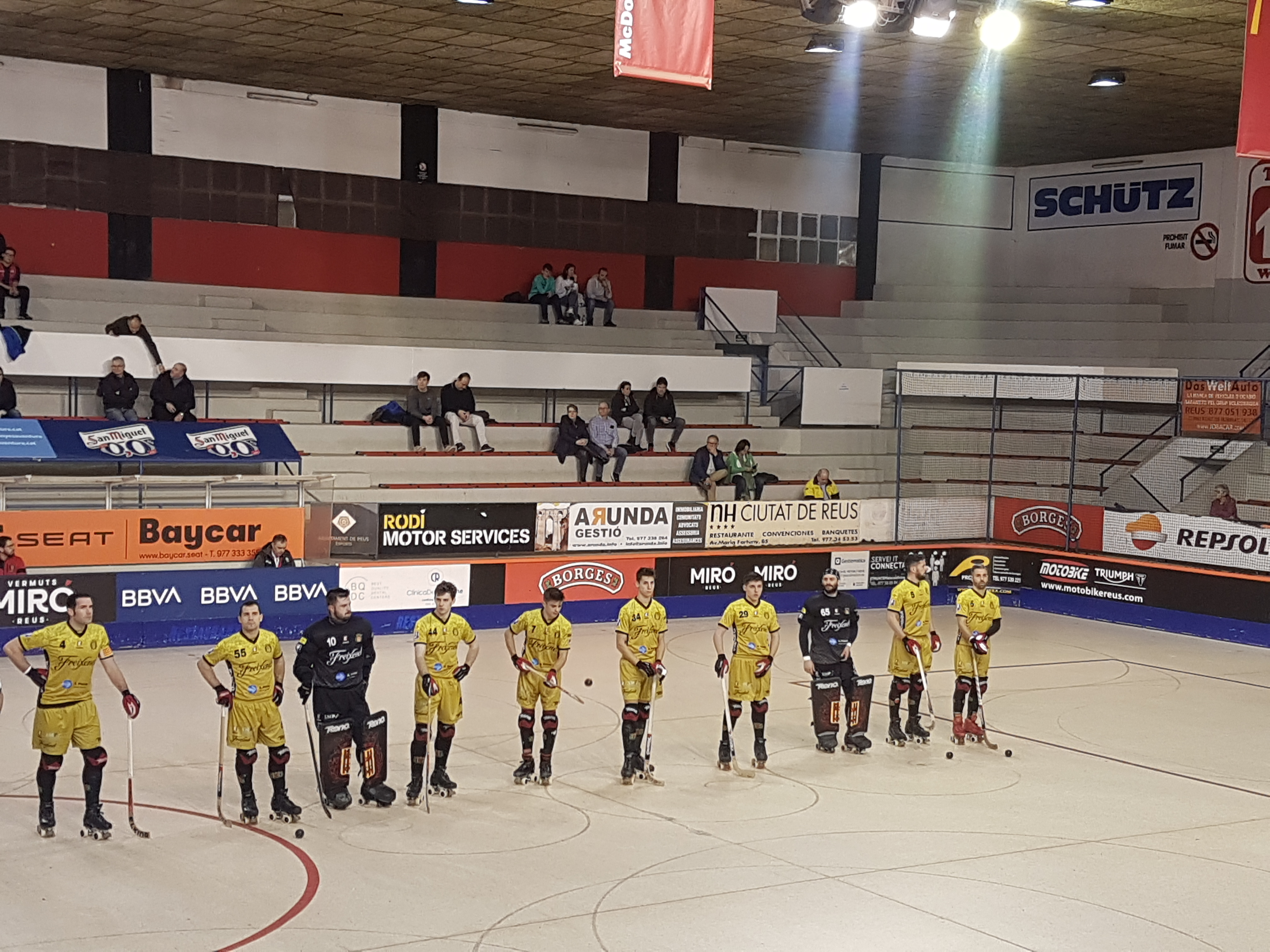 Plantilla Club Esportiu Noia